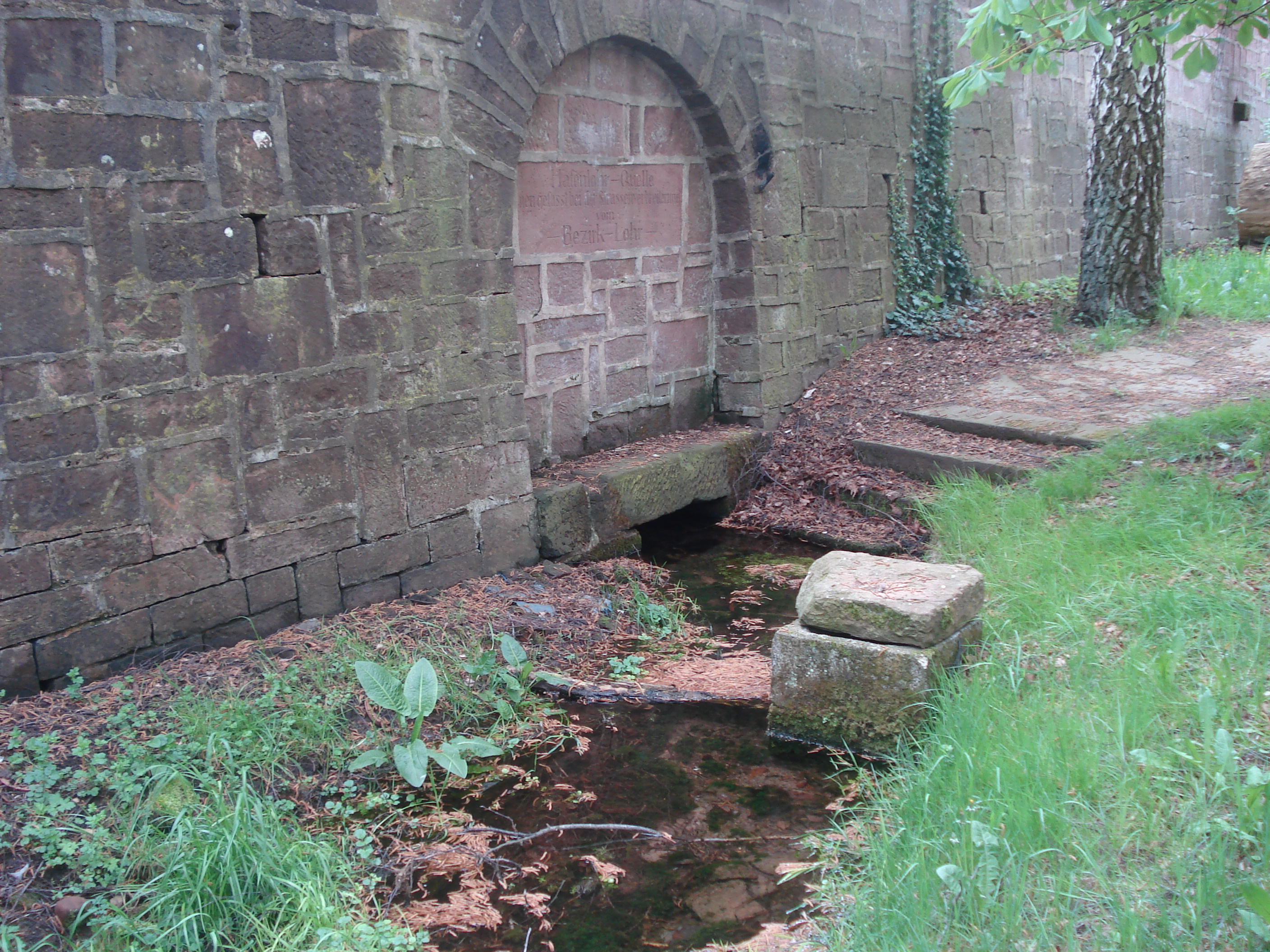 Die Hafenlohrquelle in Rothenbuch